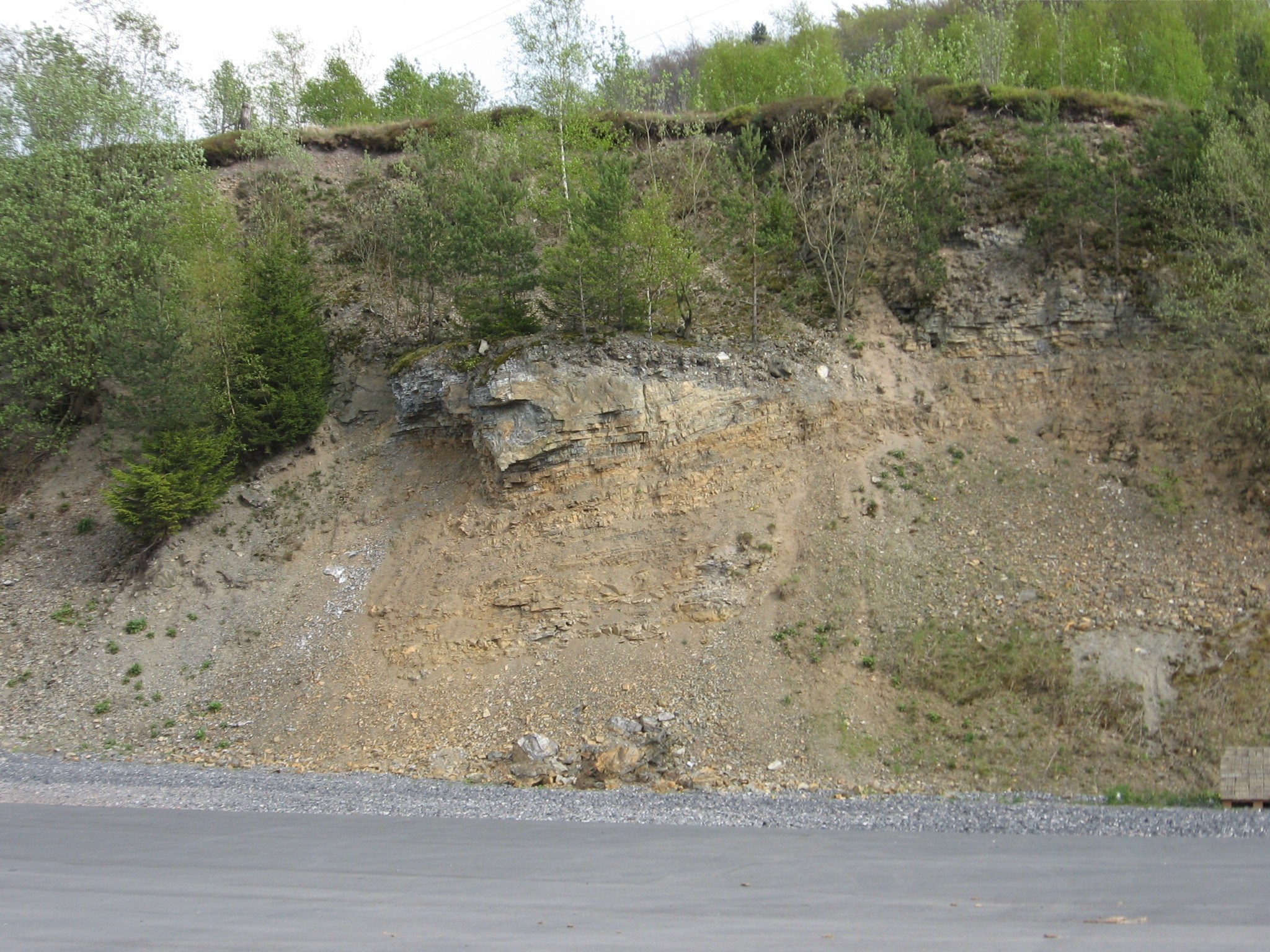 Teilansicht des Naturdenkmal Spezialfaltung südsüdwestlich Hövel im Stadtgebiet Sundern im Hochsauerland, NRW.